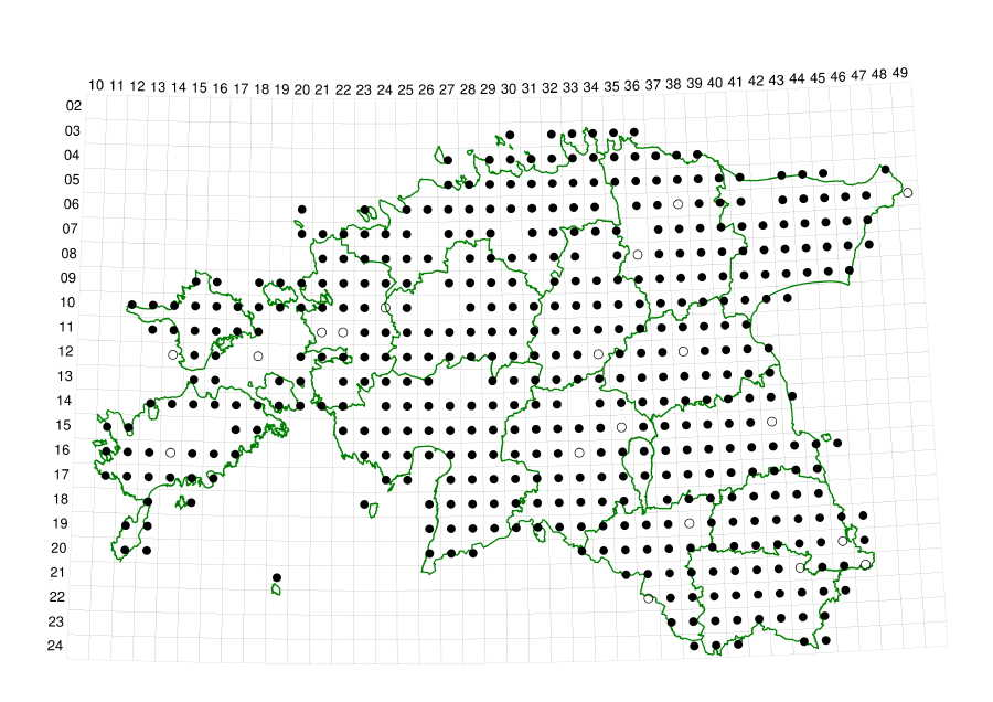 Ohtene sõnajalg Eestis